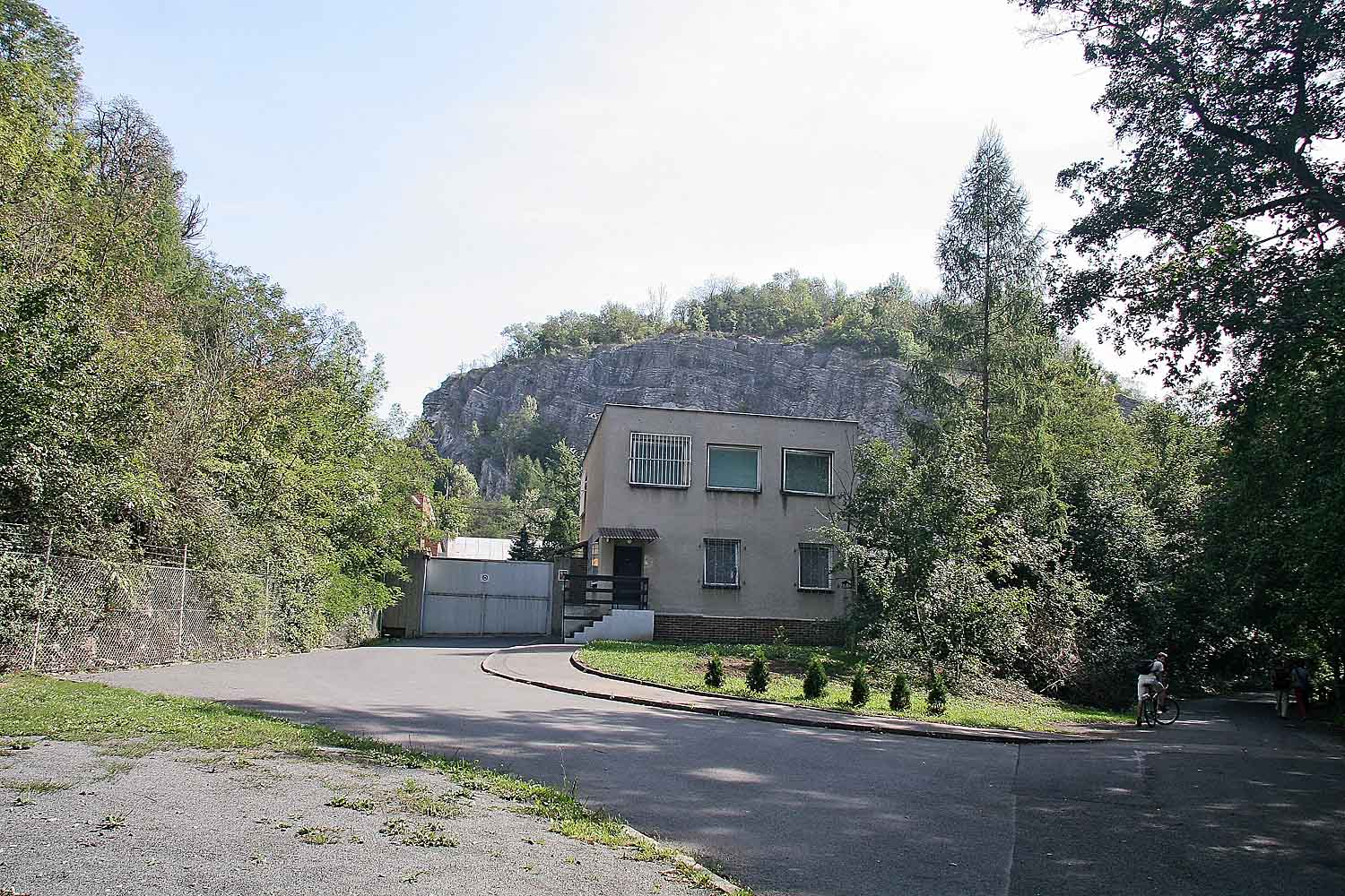 Natural Reserve Prokopské údolí, Praha, Czech Republic, Prokopský lom autor: Prazak Date: 16. 8. 2006